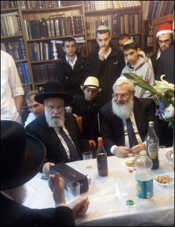 הרב אלי בן דהן יחד עם הרב יעקב שפירא